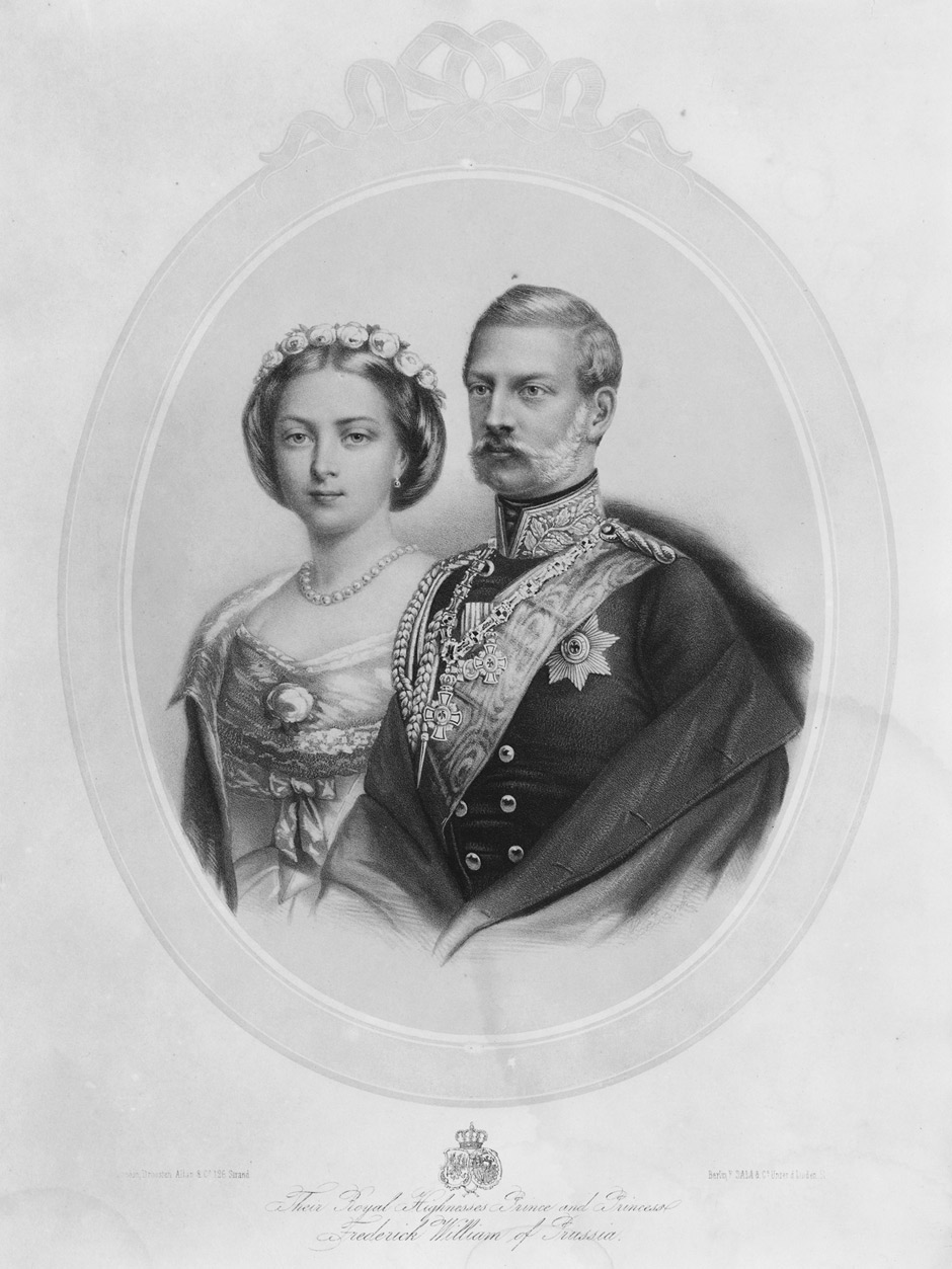 Friedrich III. und seine Gattin Victoria. Their Royal Hignesses Prince and Princess Frederick William of Prussia. Doppel-Portrait im Oval. Kreidelithographie mit beigefarbenem Tondruck. 43,5 x 29,5 cm. Berlin, F. Sala & Co.